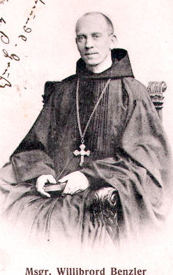 Bischof Wilibrord Benzler als Benediktinerabt